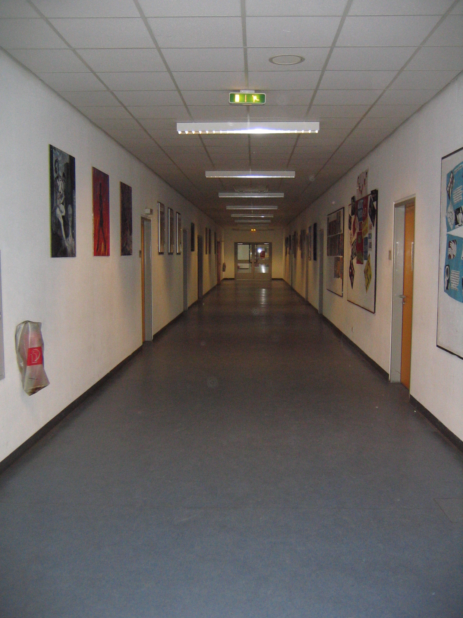 Flur des Fachbereichs Kunst